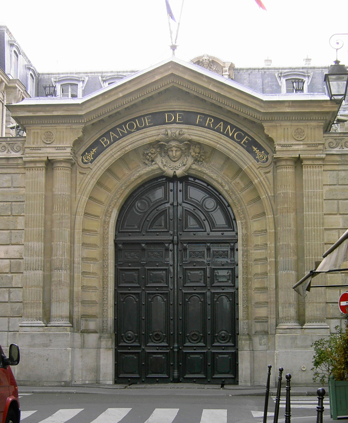 Portail de la Banque de France, anciennement Hôtel de Toulouse, n° 1 de la rue La Vrillière (ex rue de la Vrillière), Ier arrondissement, Paris, France.